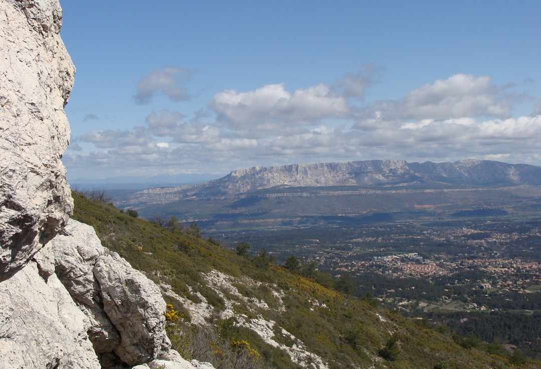 Vue sur la montagne Sainte-Victoire depuis la crête du massif de l'Étoile aux environs du Grand Puech. Dans la plaine, Gréasque et Fuveau. A l'horizon, la montagne de Lure, enneigée.